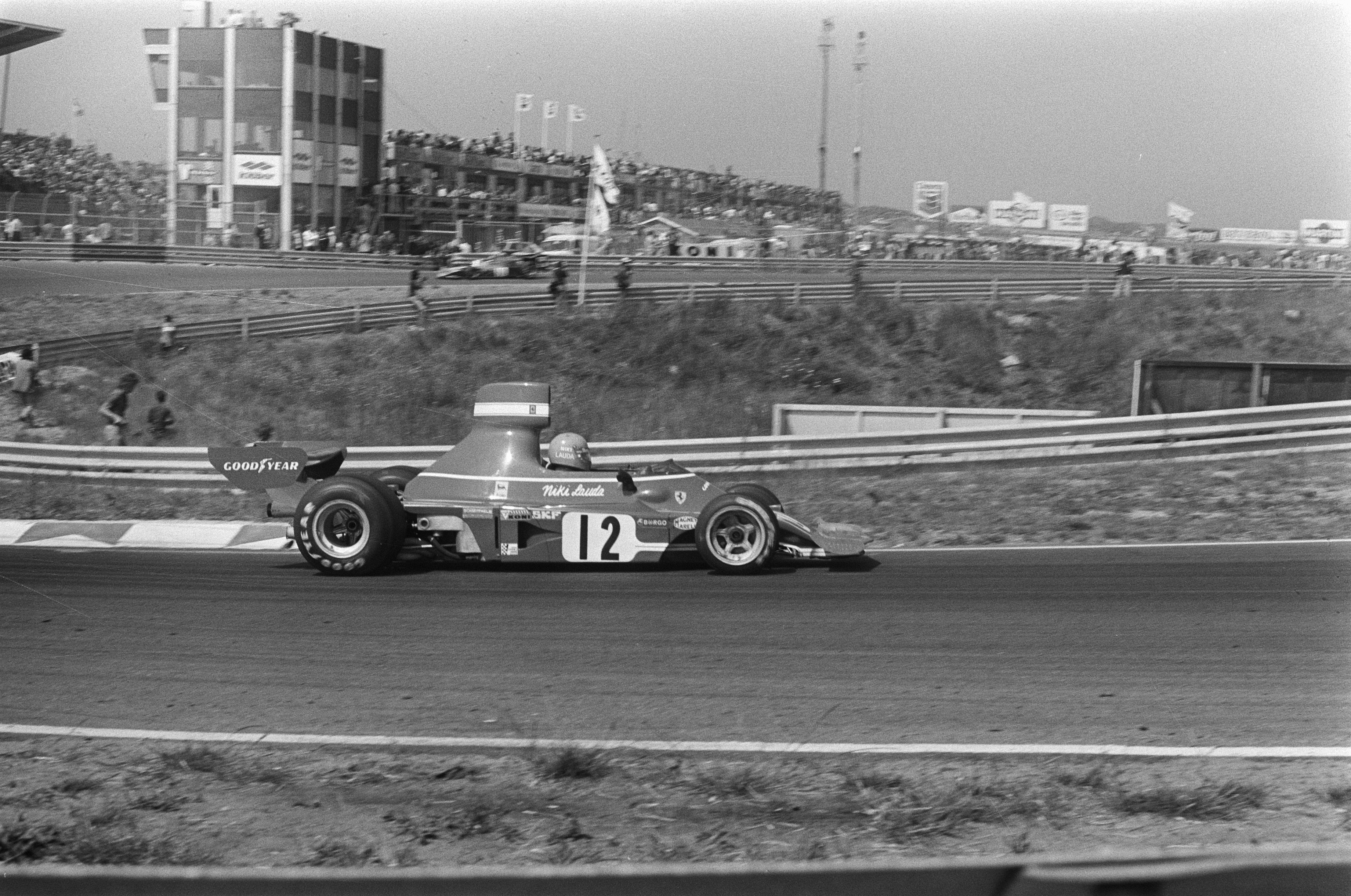 Grand Prix op Zandvoort, Lauda in actie (12).